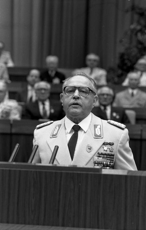 Berlin, Erich Mielke spricht zum Jahrestag des MfS ADN-ZB/Mittelstädt 6.2.85 Berlin Kampfmeeting Armeegeneral Erich Mielke, Mitglied des Politbüros des ZK der SED und Minister für Staatssicherheit, hielt auf einem Kampfmeeting zum 35. Jahrestag der Bildung des Ministeriums für Staatssicherheit die Festrede. Die Veranstaltung fand im Palast der Republik statt. Abgebildete Personen: Mielke, Erich: Minister für Staatssicherheit, Armeegeneral, Politbüro des Zentralkomitees (ZK) der SED, DDR (GND 118977490)